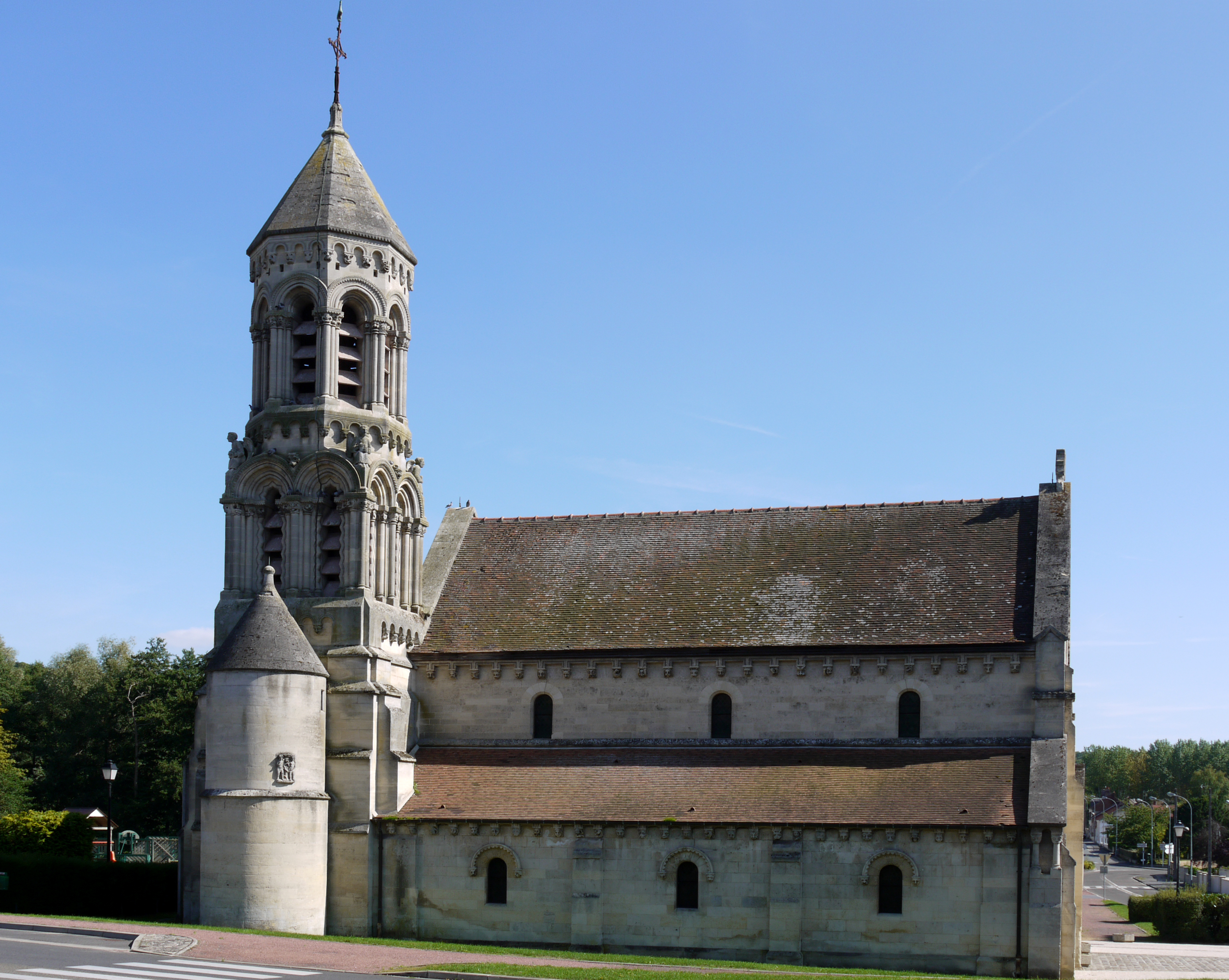 Eglise de Tracy le Val, Oise, France